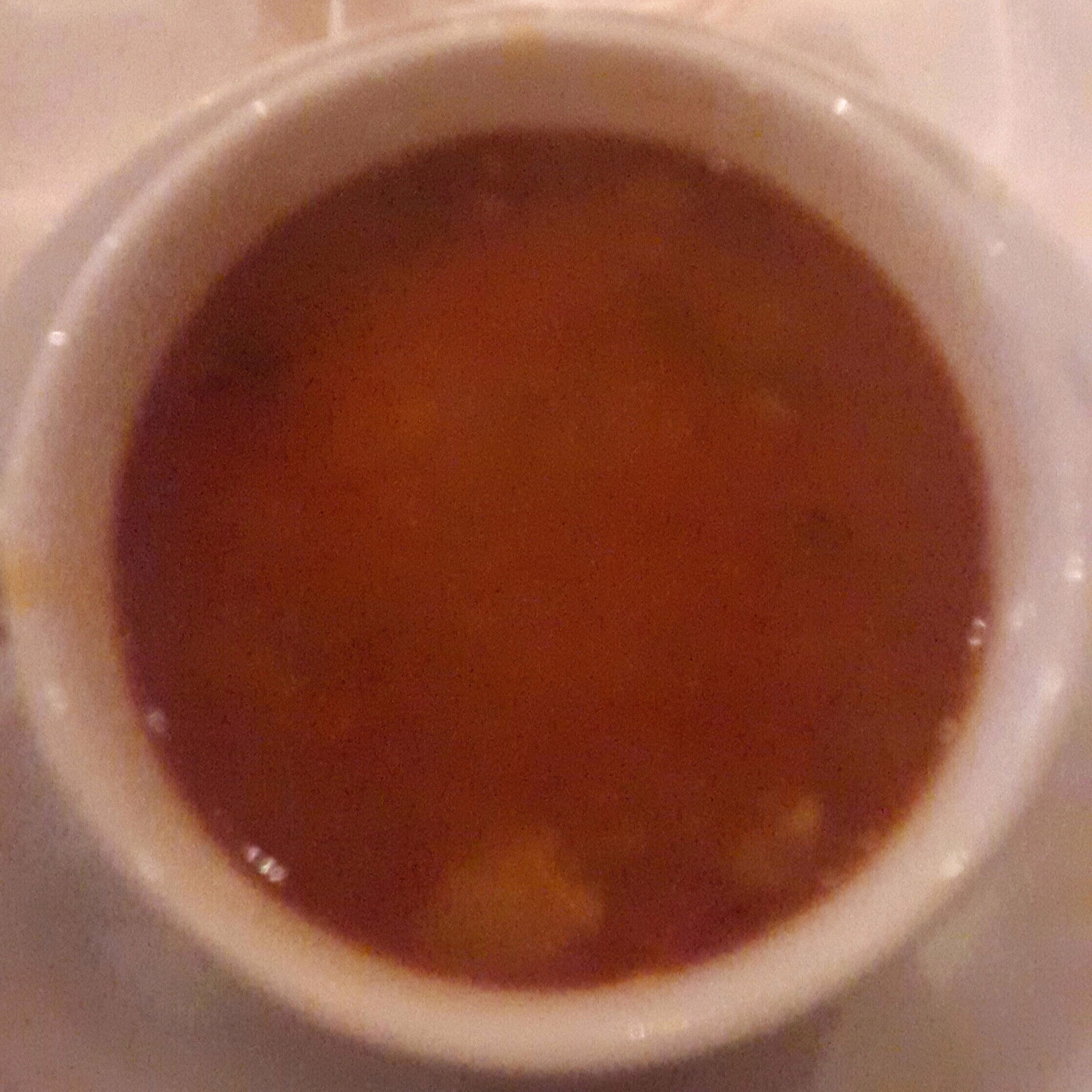 شربة فريك This is an image of food from Tunisia